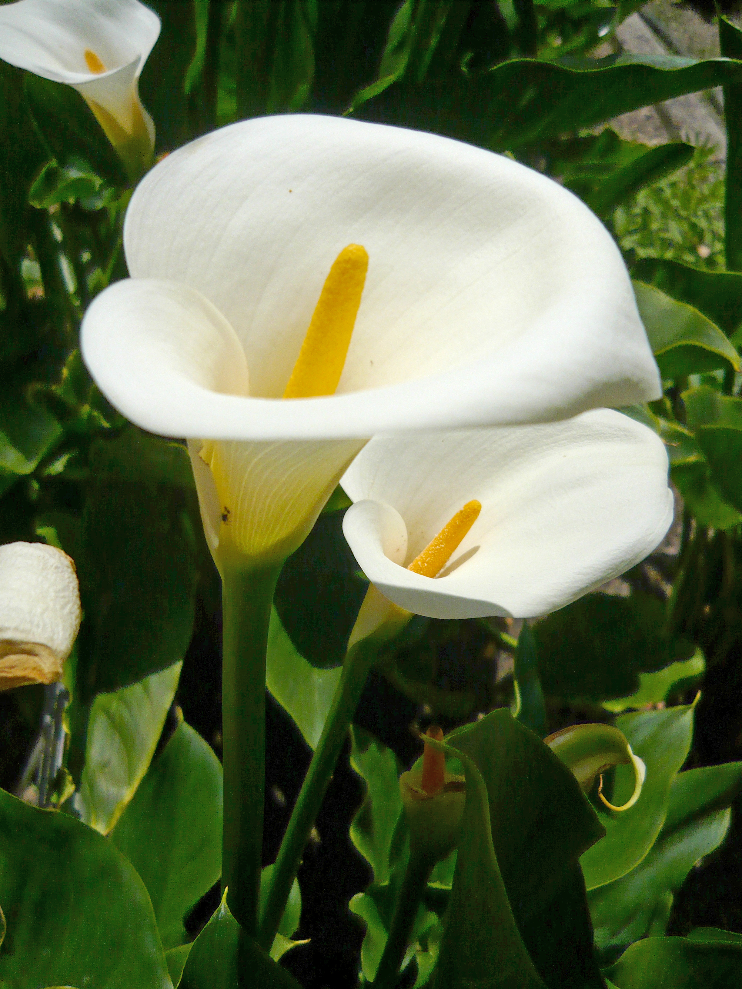 Zantedeschia aethiopica. Real Jardín Botánico de Madrid.